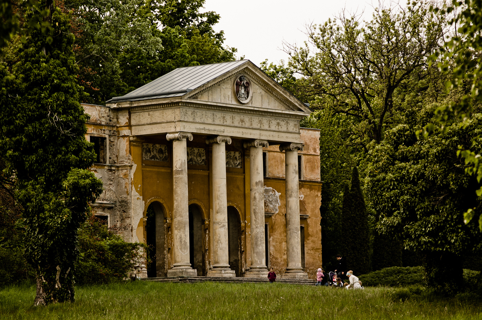 Habsburg kastély megmaradt középrésze (Alcsútdoboz, Arborétum) This is a photo of a monument in Hungary, Identifier: 14952